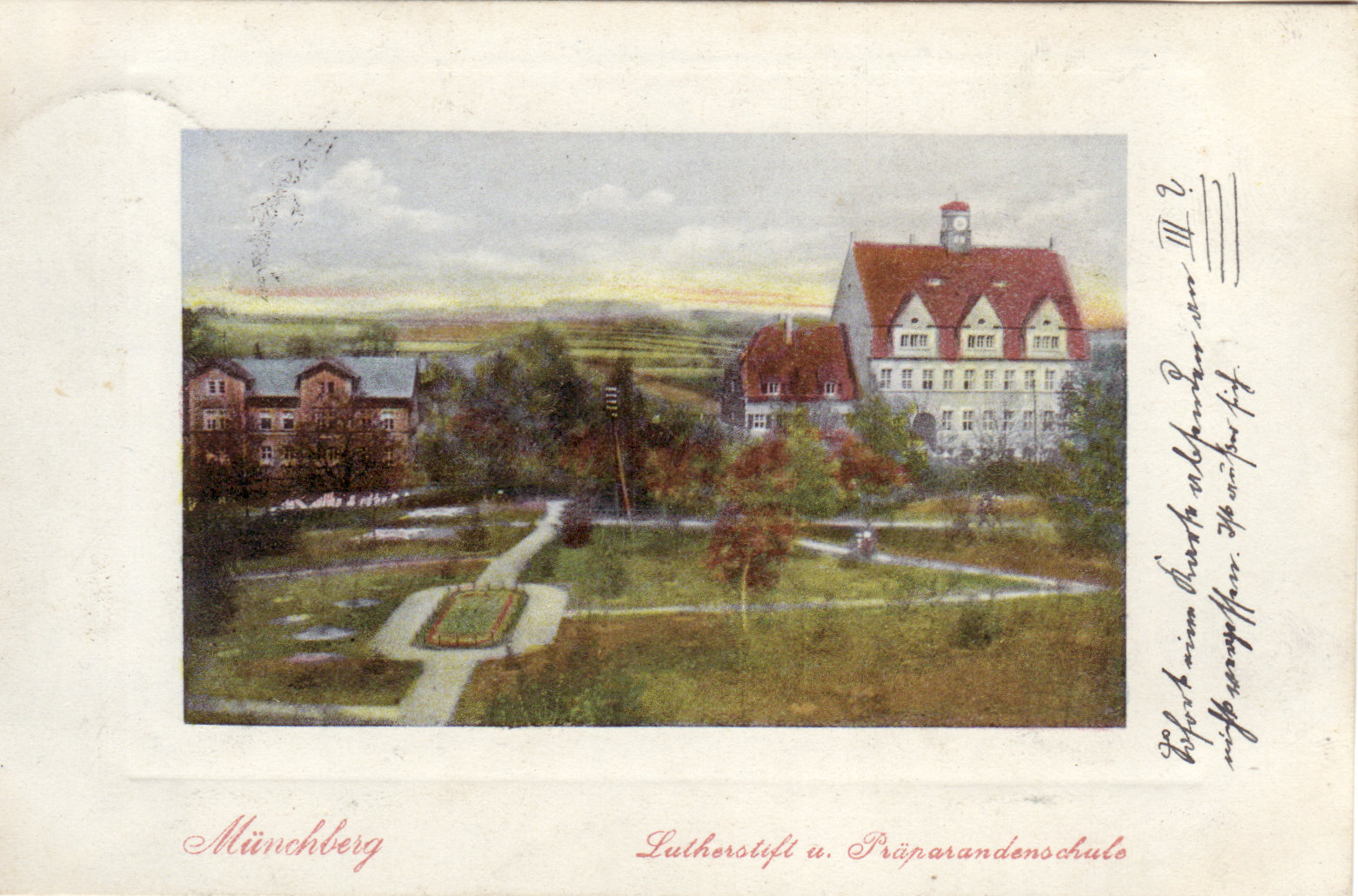 Alte Postkarte von der ehem. Präparandenschule Münchberg